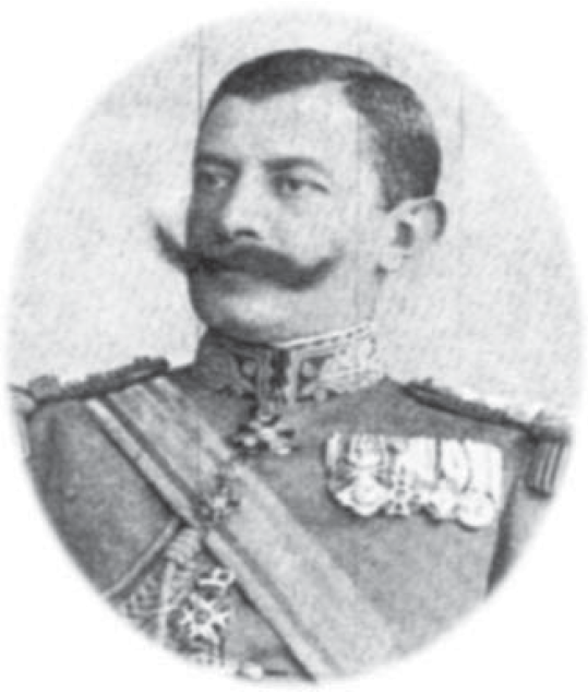 General Gheorghe Georgescu comandant al Corpului 5 Armată în anul 1916 Restricţii - fără restricţii datorită vechimii